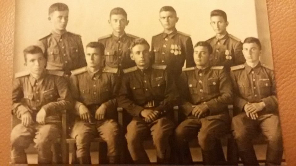 Saratov 1949